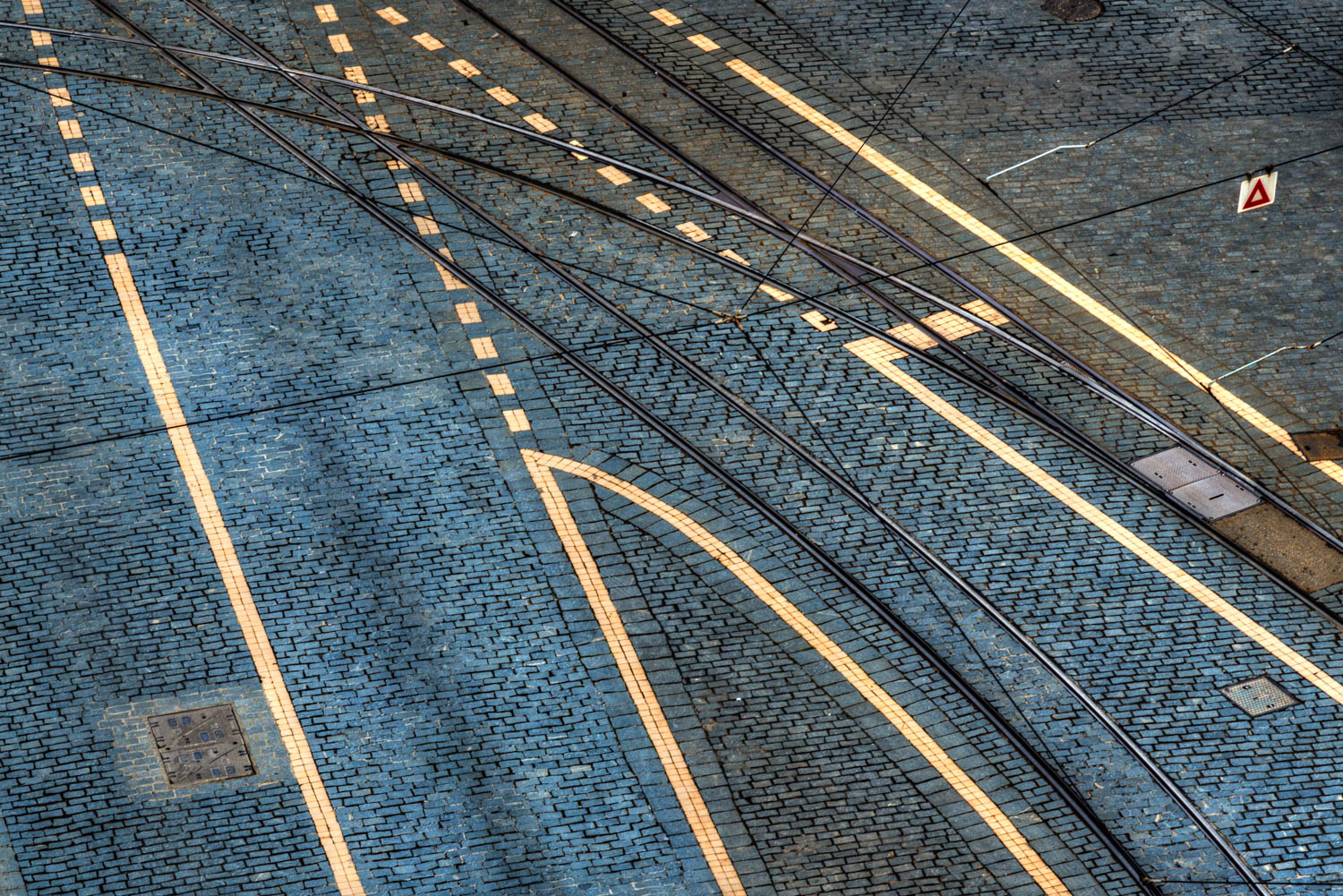 Rails de trams